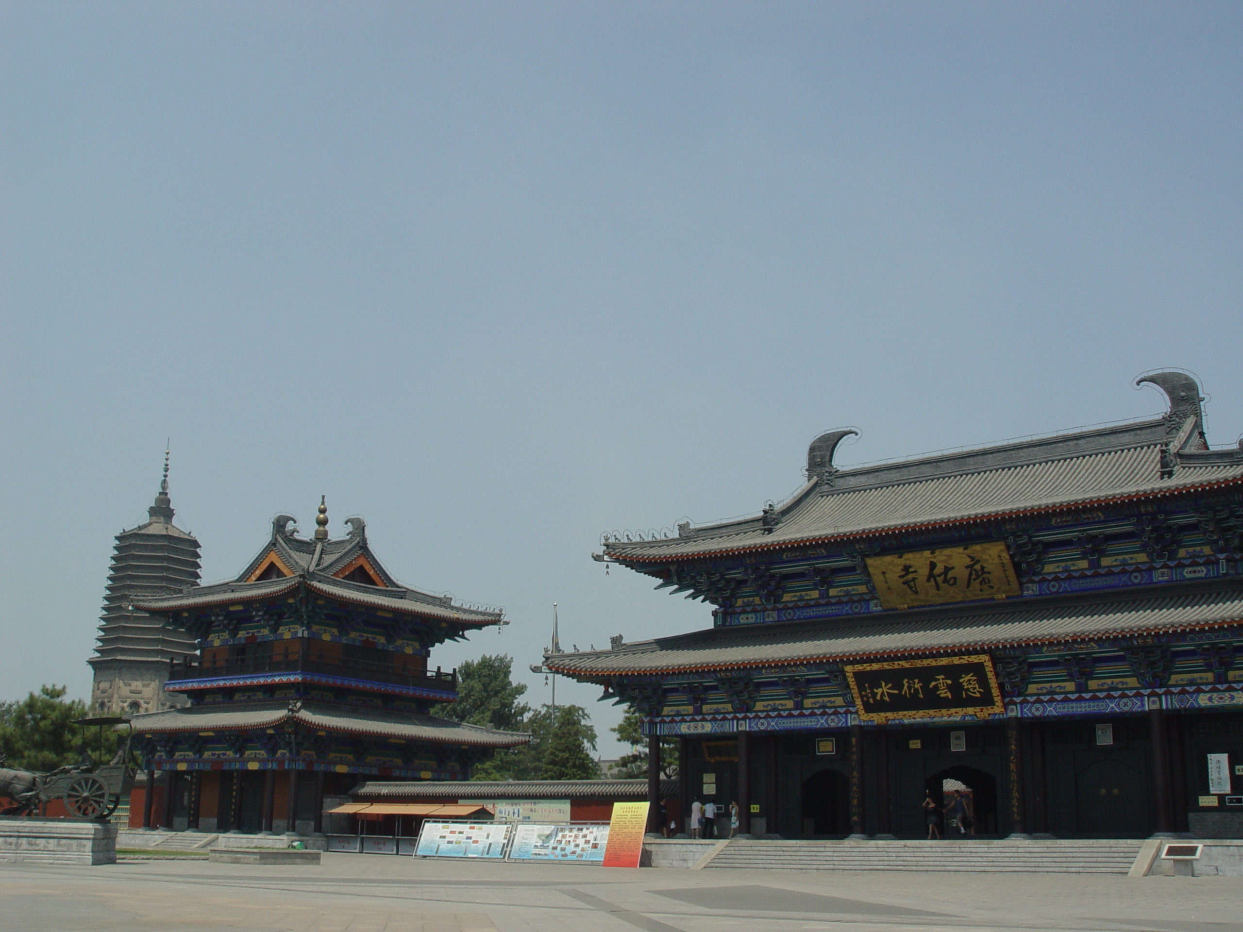 辽阳的太庙(广佑寺)